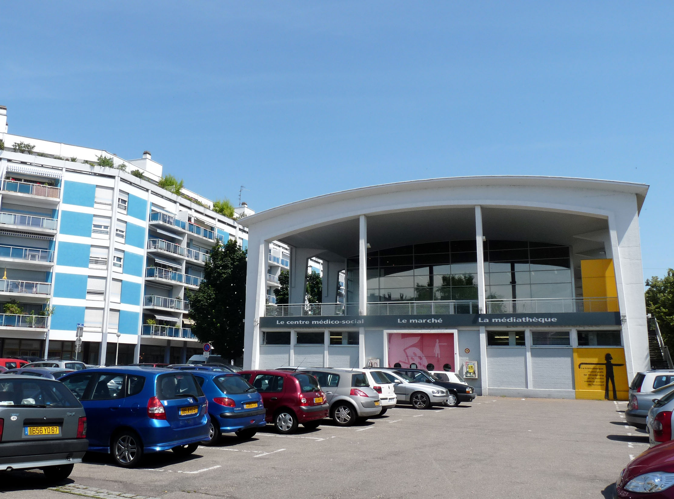 Centre médico-soial, marché et médiathèque à Strasbourg-Neudorf